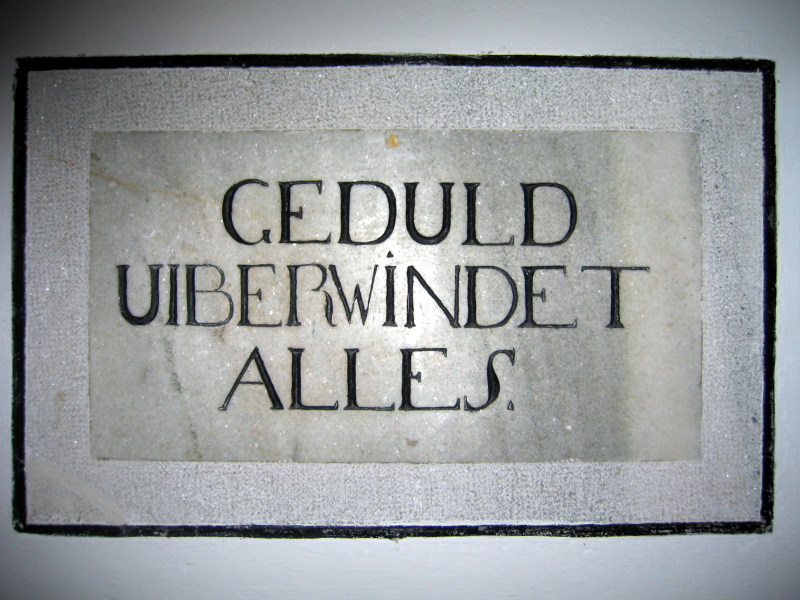 Geduld uiberwindet alles